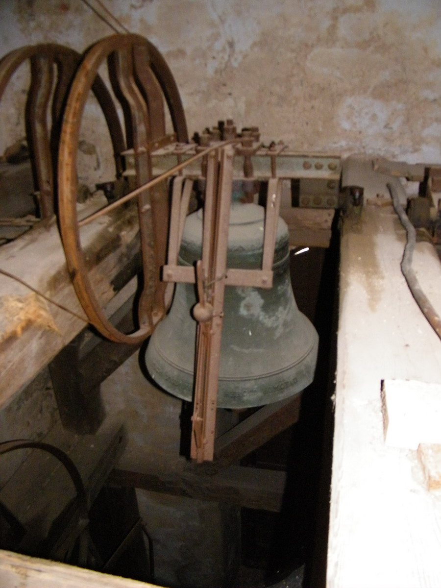 Kostel svatého Mikuláše v Mikulášovicích, zvon sv. Anna, odlit 1921, zvonař Richard Herold. Odlit jako nejmenší ve věži (220 kg), sloužil jako umíráček.[1]